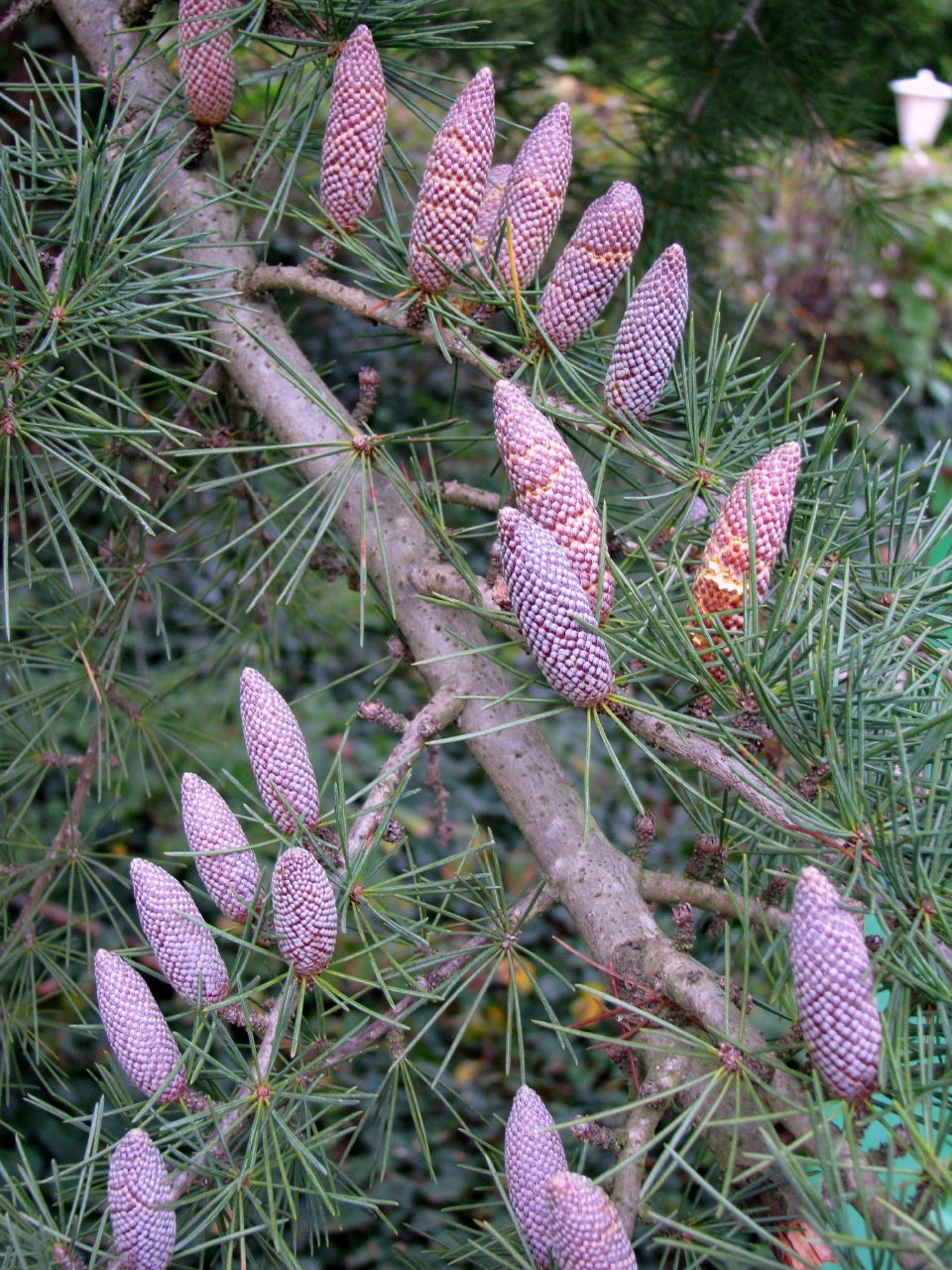 Cedrus deodara mature pollen cones. Cultivated, Bad Münster am Stein, Rheinland-PfalzNahe, Deutschland.